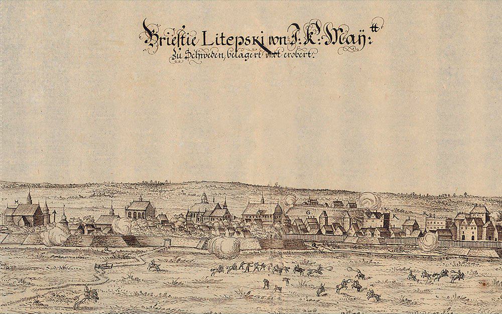 Беларуская (тарашкевіца): Берасьце Літоўскае (Bieraście Litoŭskaje). Аблога места ў вайну Швэцыі з Рэччу Паспалітай, 1657